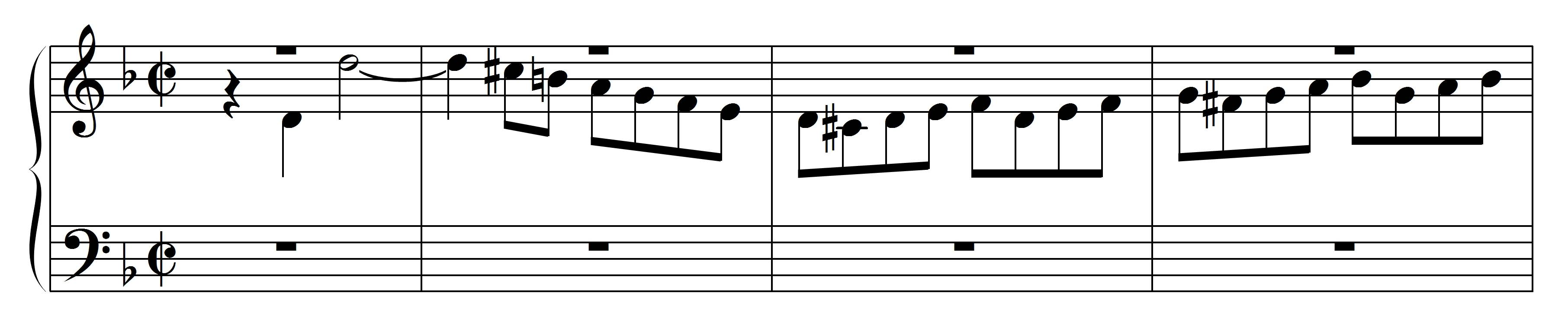 Bach, JS, Incipit Contrapunctus 9, BWV 1080